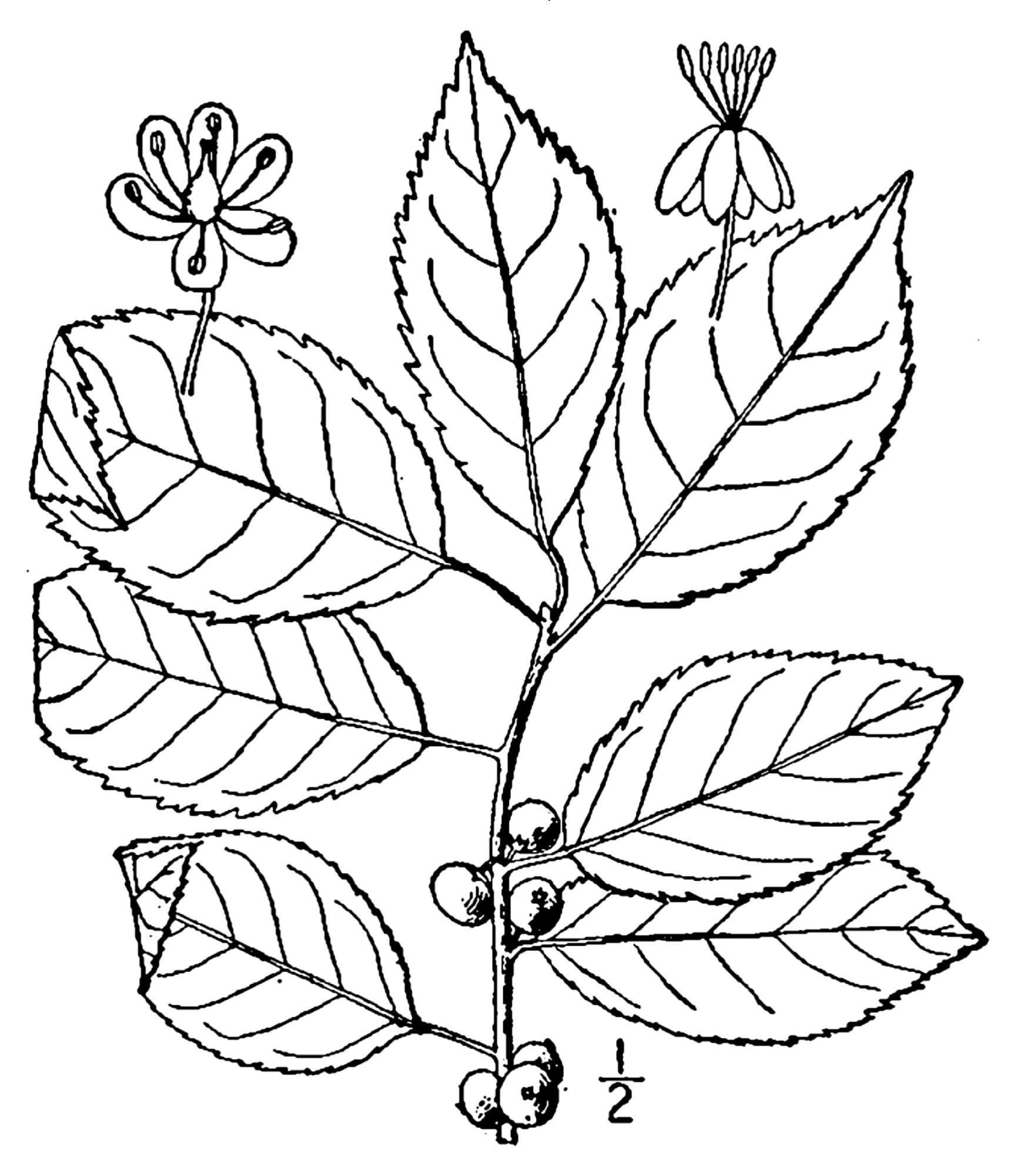 Ilex verticillata